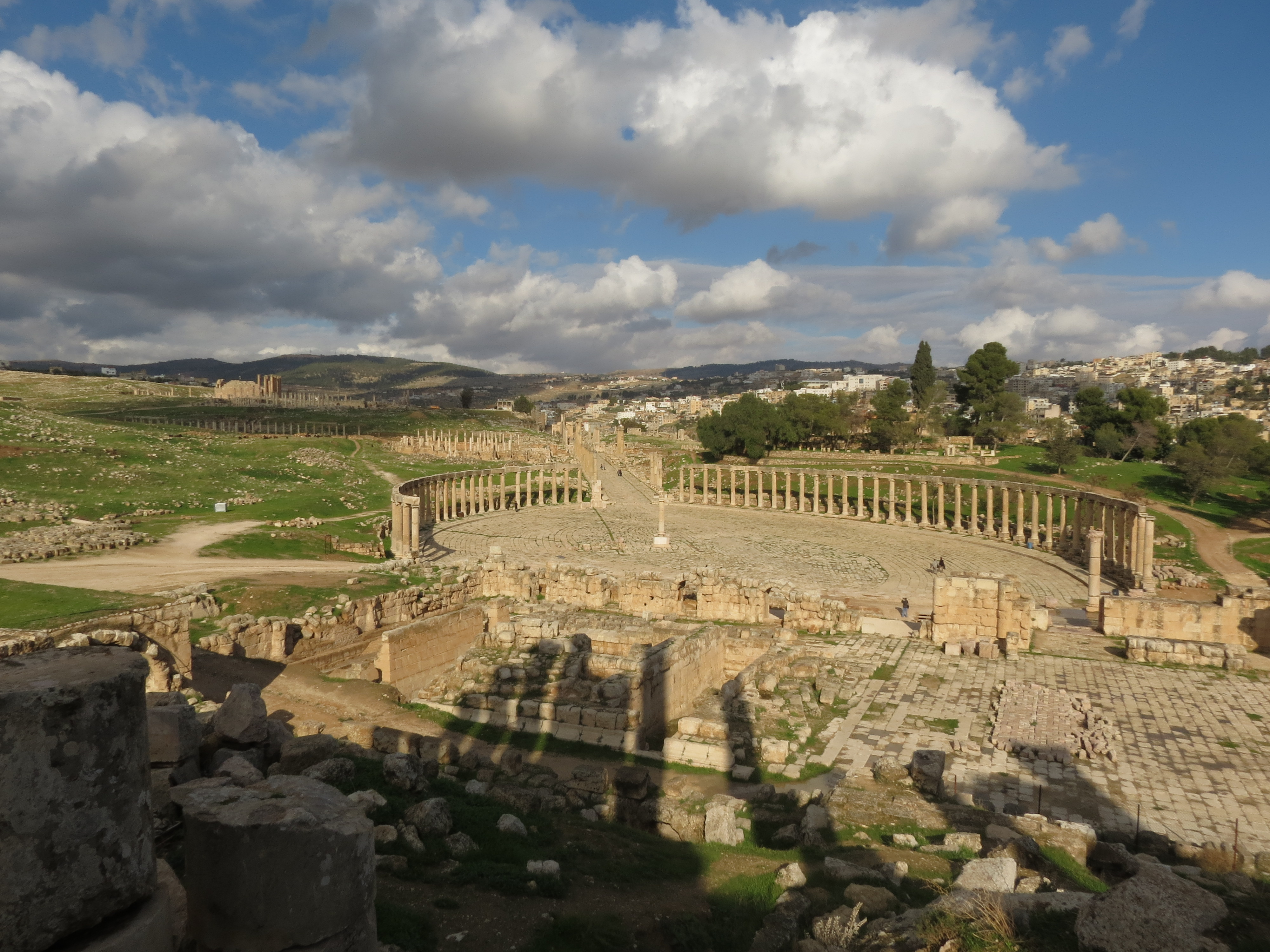 Une vue de la Jordanie.